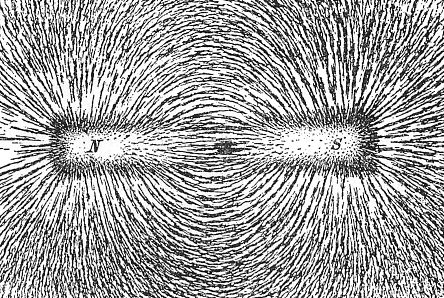 Magnetfeld mit Eisenfeilspänen sichtbar gemacht